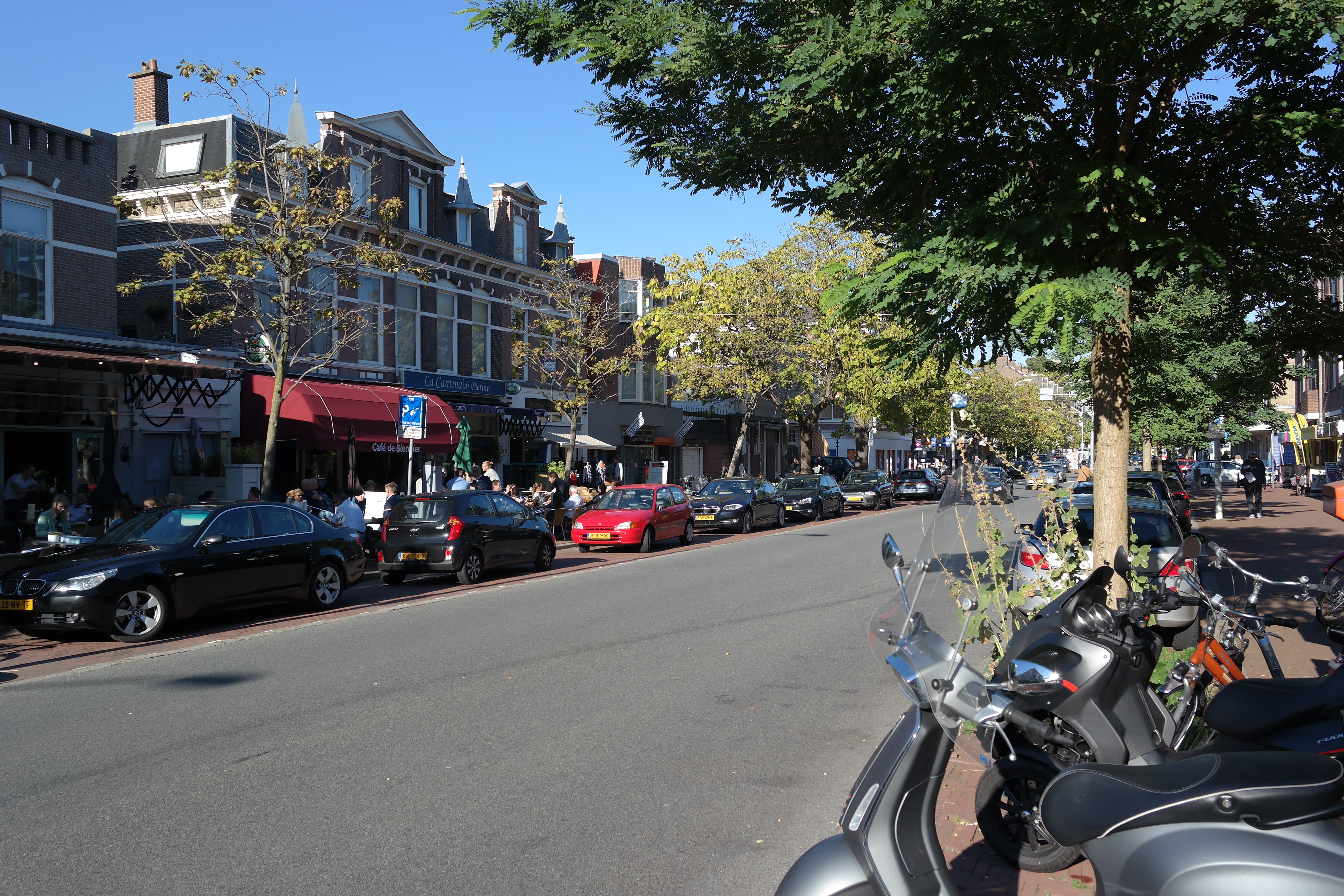 De Theresiastraat in Den Haag, ter hoogte van de Adelheidstraat.